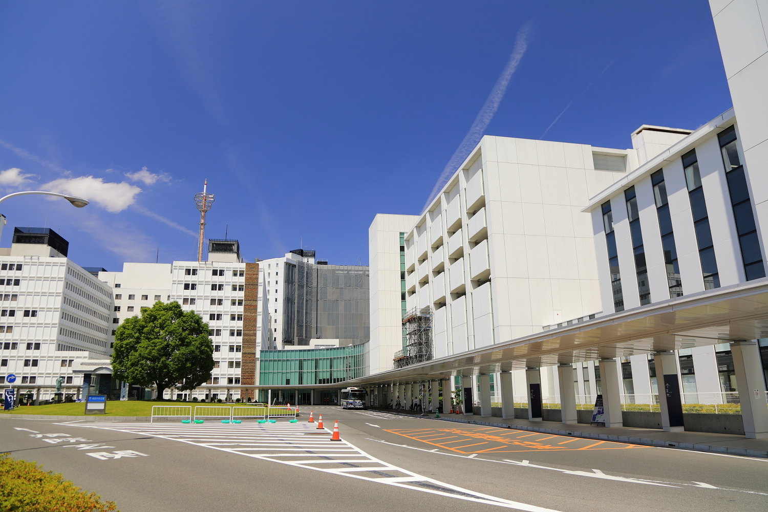 藤田保健衛生大学病院2号棟・外来棟近影（2018年（平成30年）6月）